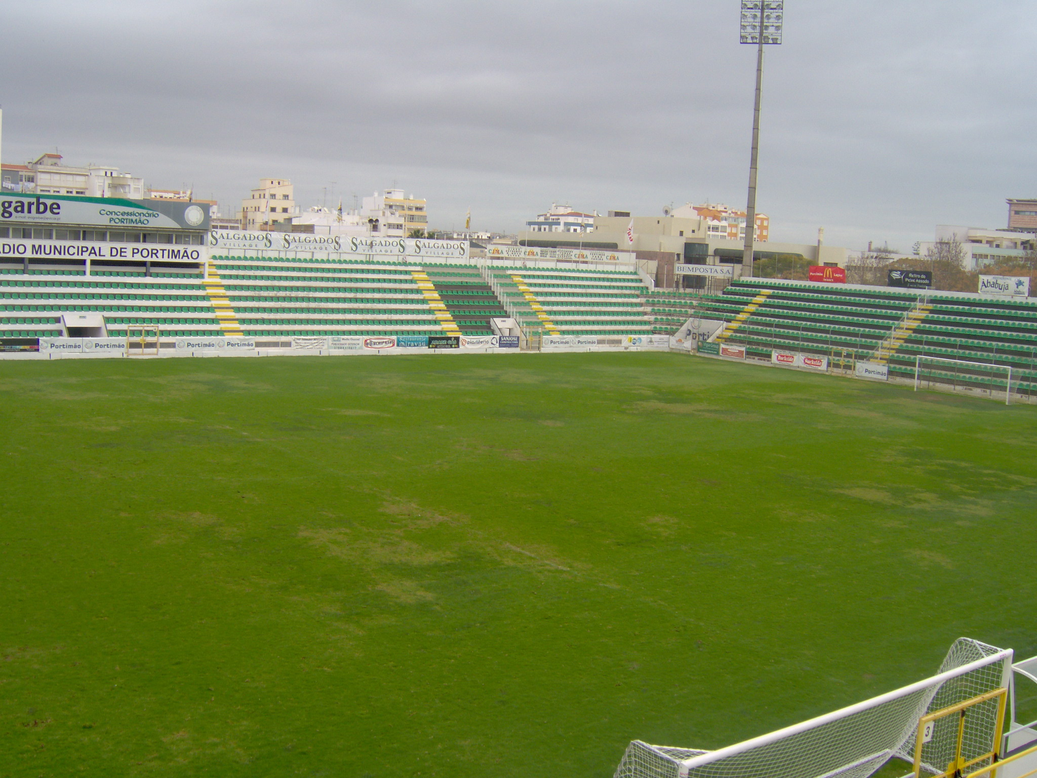 Estádio Municipal de Portimão visto do interior